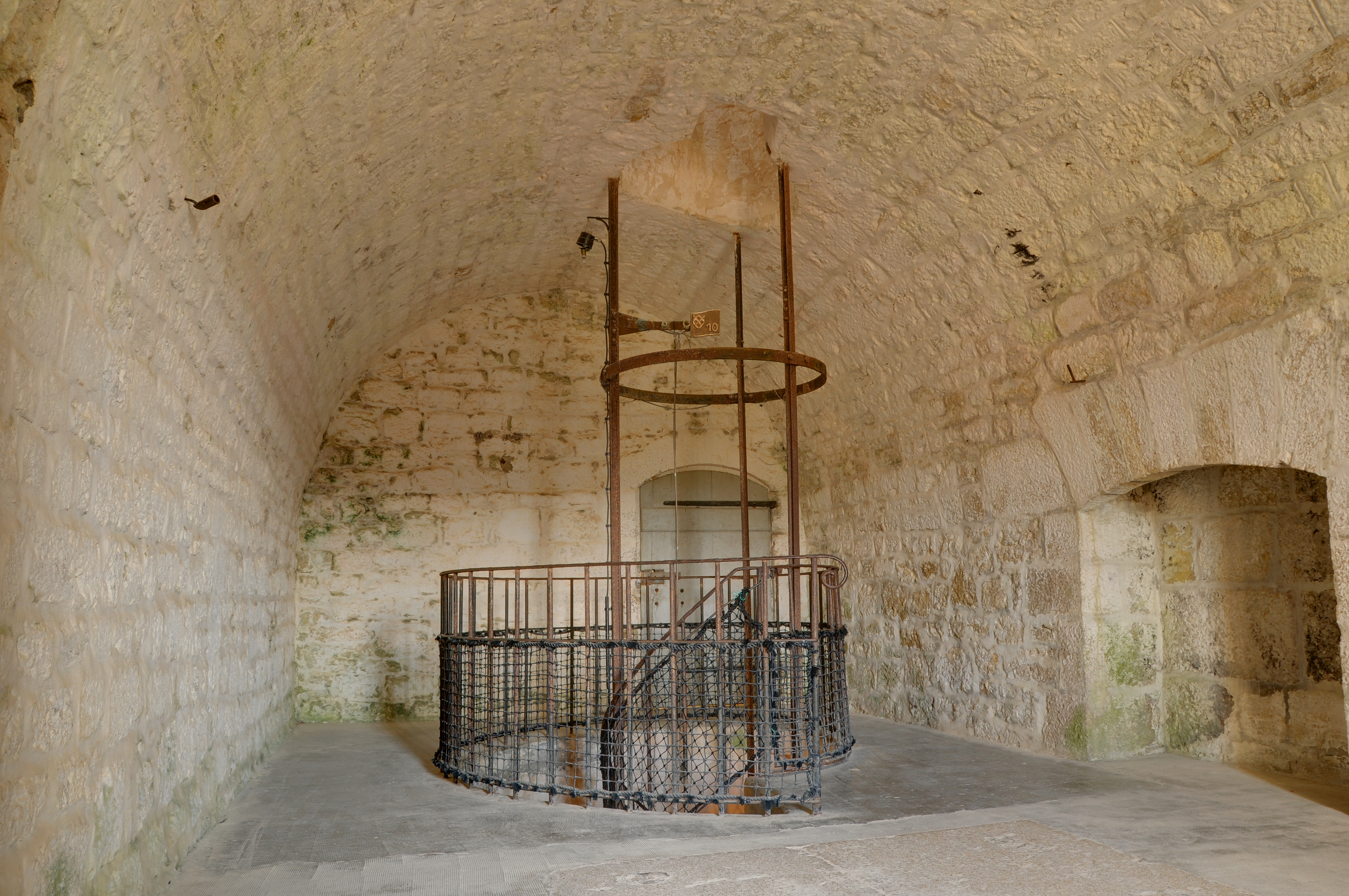 This photograph was taken with a Nikon D300 Fort de Joux : accès à un escalier en colimaçon avec, au centre, un monte-charge (HDR).